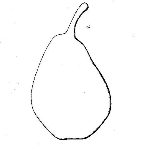 Beurré Dumortier, Dict. de pomologie, 1867, André Leroy.